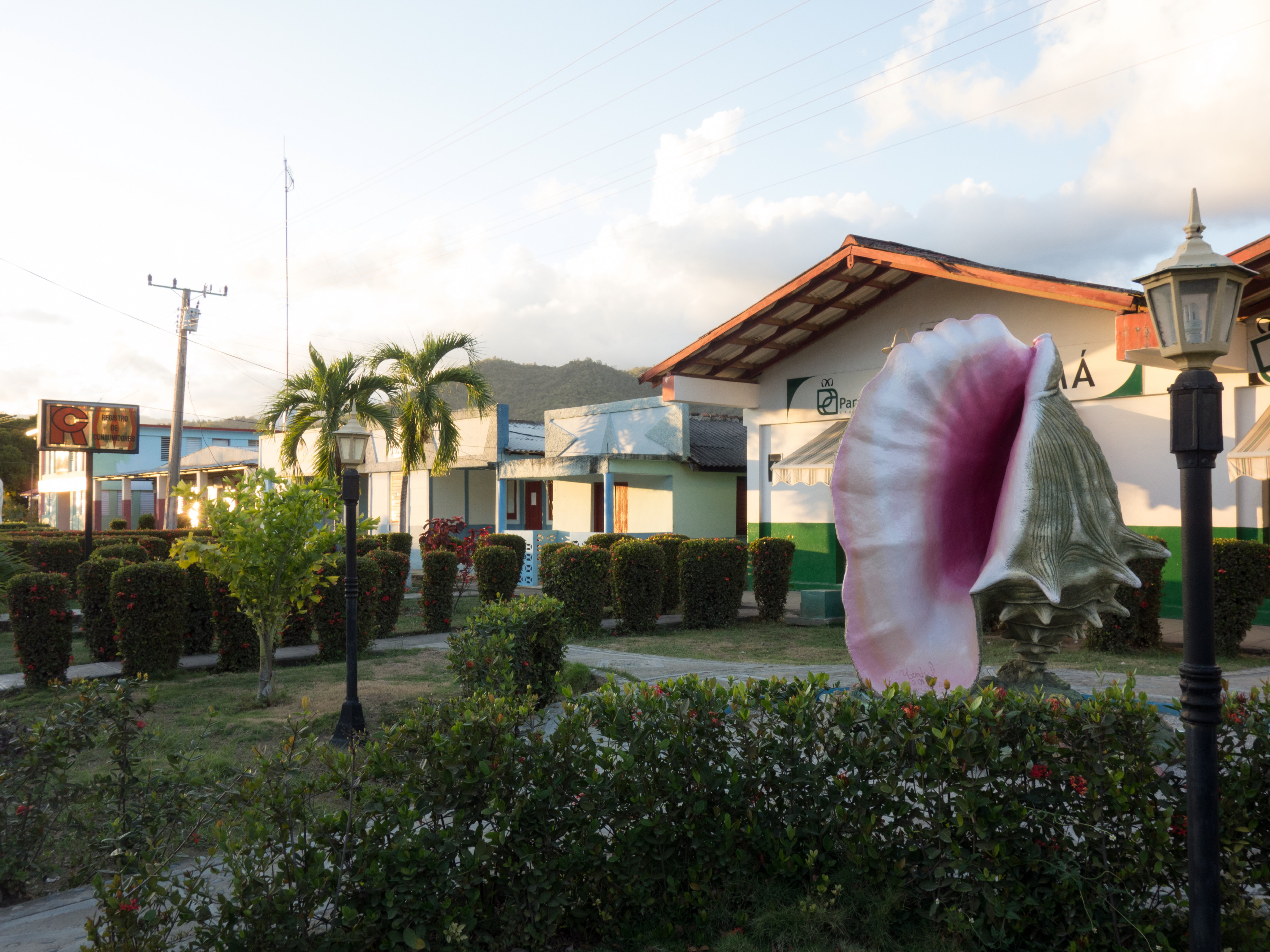 Chivirico, der Hauptort der Gemeinde Guamá, Provinz Santiago de Cuba, Kuba